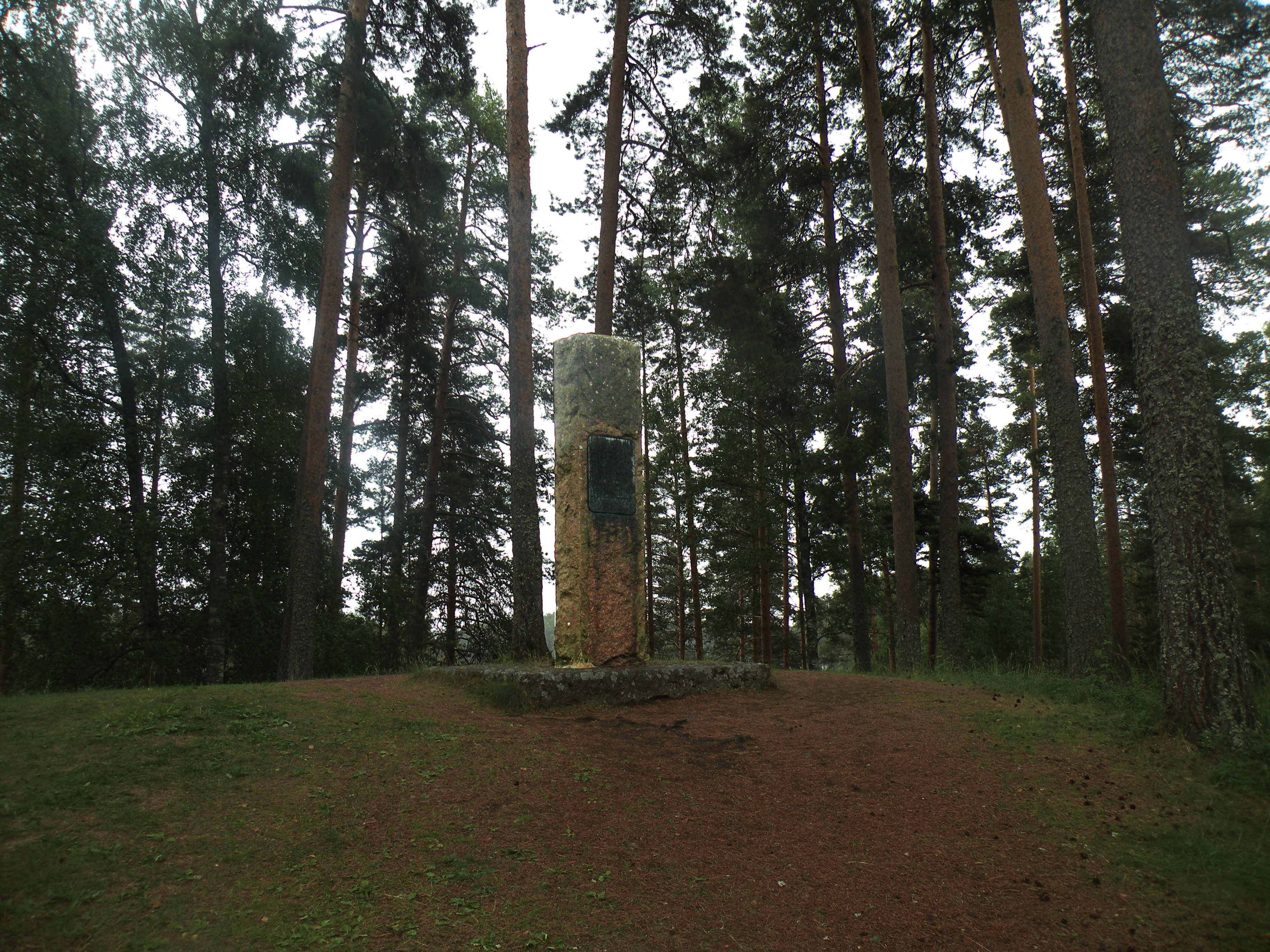 Вершина холма Рунеберга